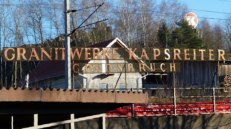 Schild des Steinbruches "Gindsbruch" der Firma Kapsreiter in Gopperding, Gemeinde St. Florian am Inn, Bezirk Schärding, Österreich